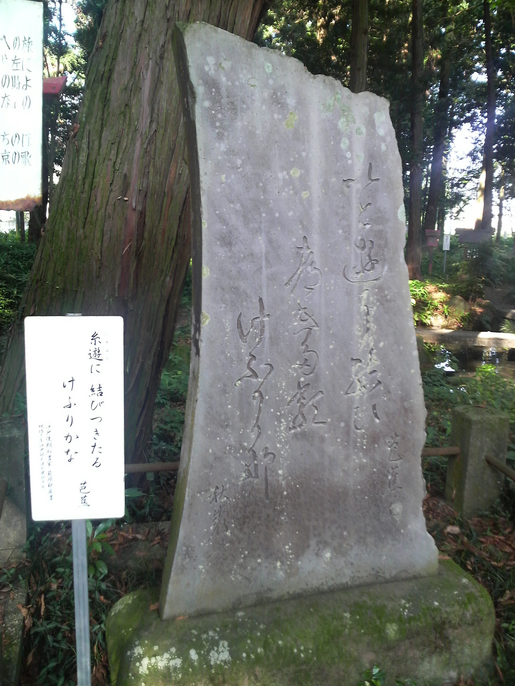 大神神社（栃木県栃木市）境内の松尾芭蕉句碑「いと遊に結びつきたるけふりかな」